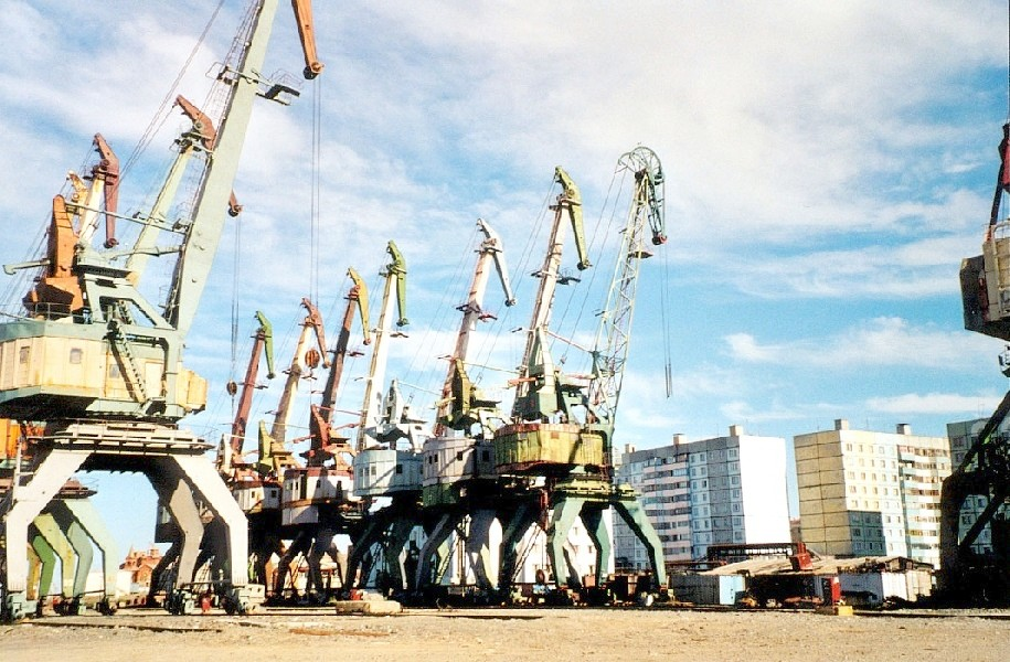 Verladekran, geschlossene Stadt, Dudinka, Russland, Taymyria, Krasnoyarsk kray, Russland